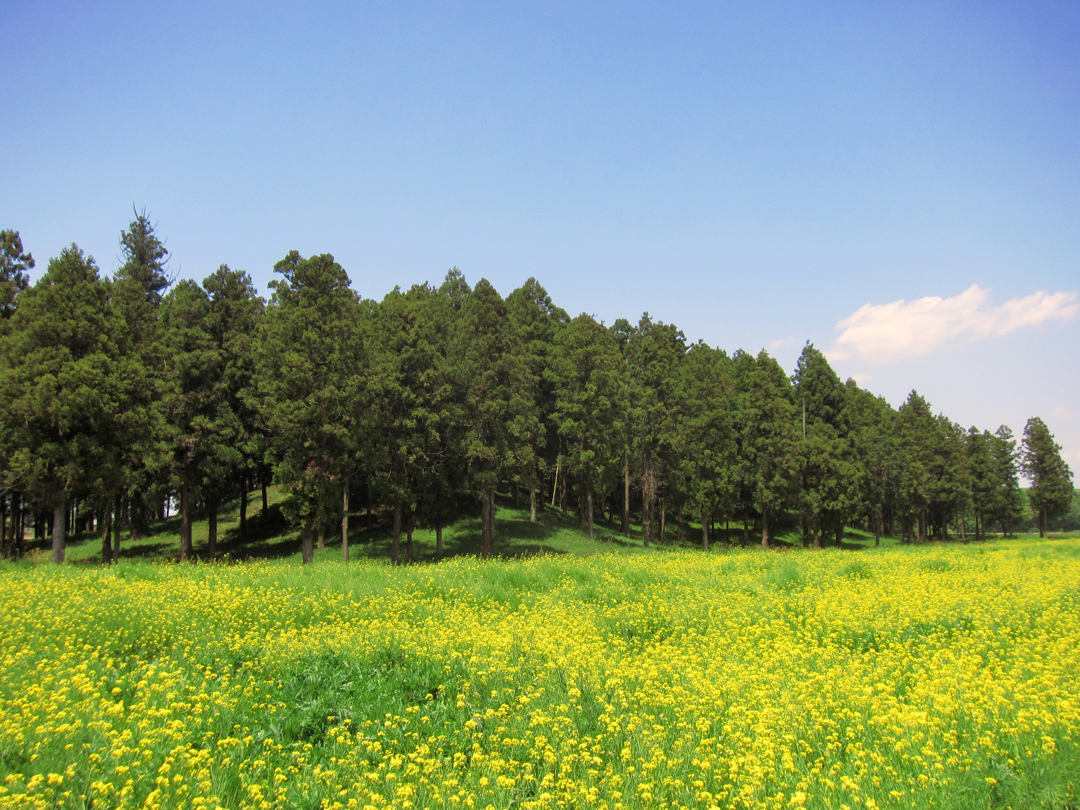 琵琶塚古墳 全景